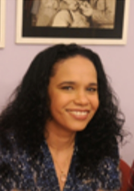 Teresa Cristina é uma cantora brasileira.